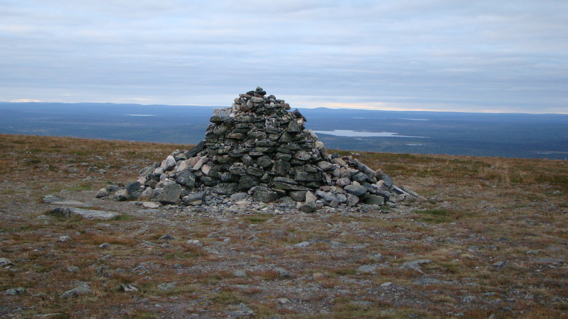 Suomalaisen Sisun monumentti syksyllä 2010 Hetta–Pallas-vaellusreitti